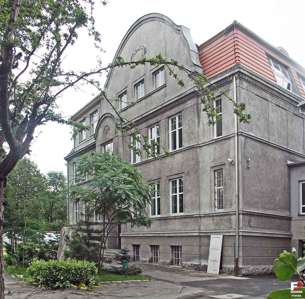 Liceum w Cieplicach na współczesnej fotografii.